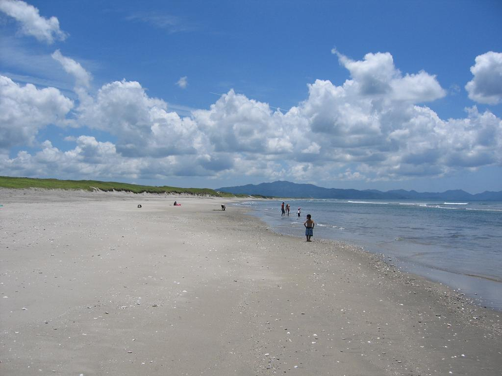 吹上浜（鹿児島県日置市）